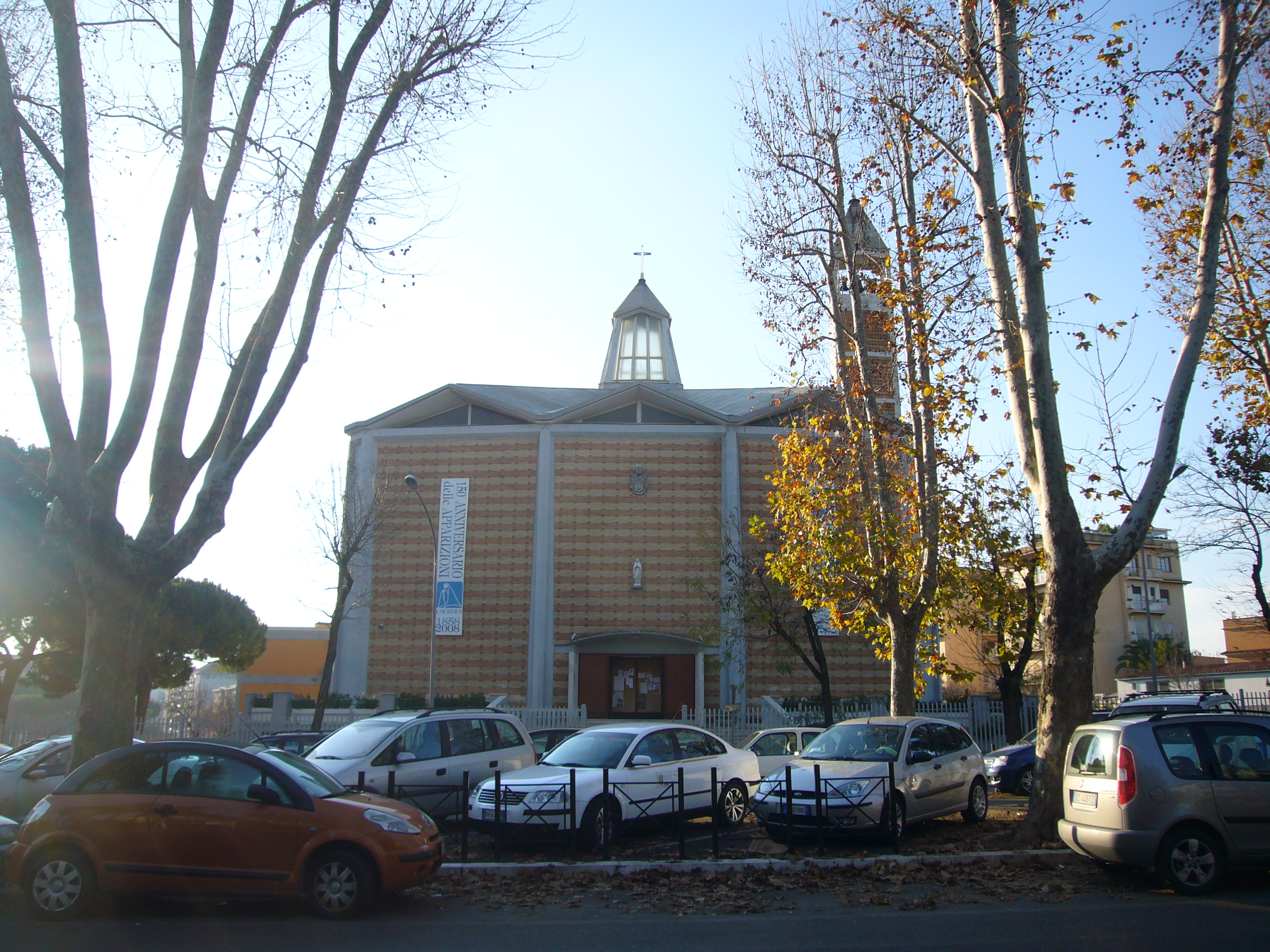 Roma, Nostra Signora di Lourdes a Tormarancia